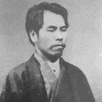 熊本バンドの一人、同志社時代の金森通倫